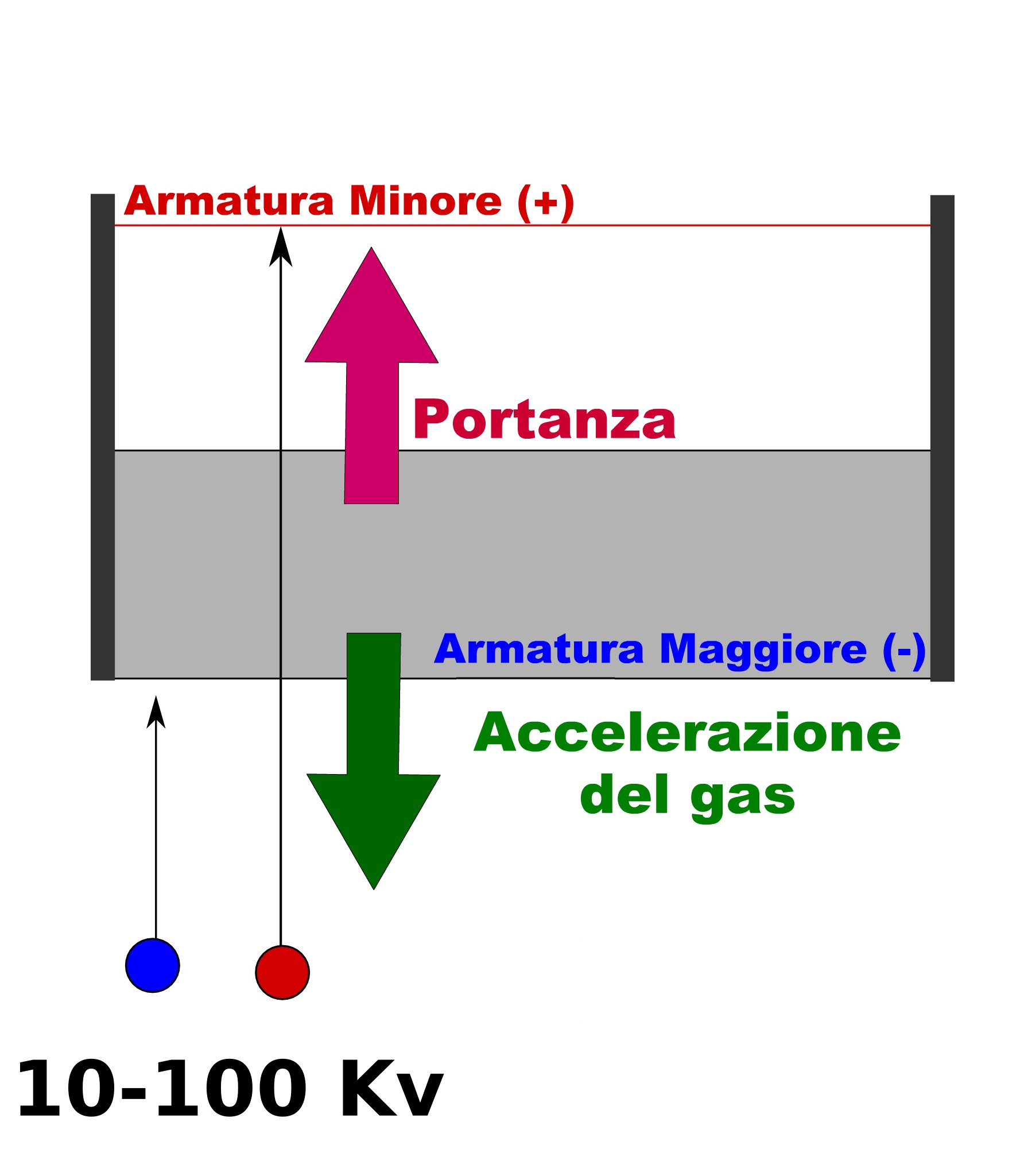 Schema del dispositivo realizzato con una semplice lamina di materiale conduttivo ed un filo sempre conduttivo.